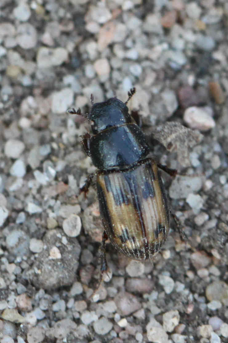 Aphodius distinctus am 3.4.2017 in der Schwetzinger Hardt